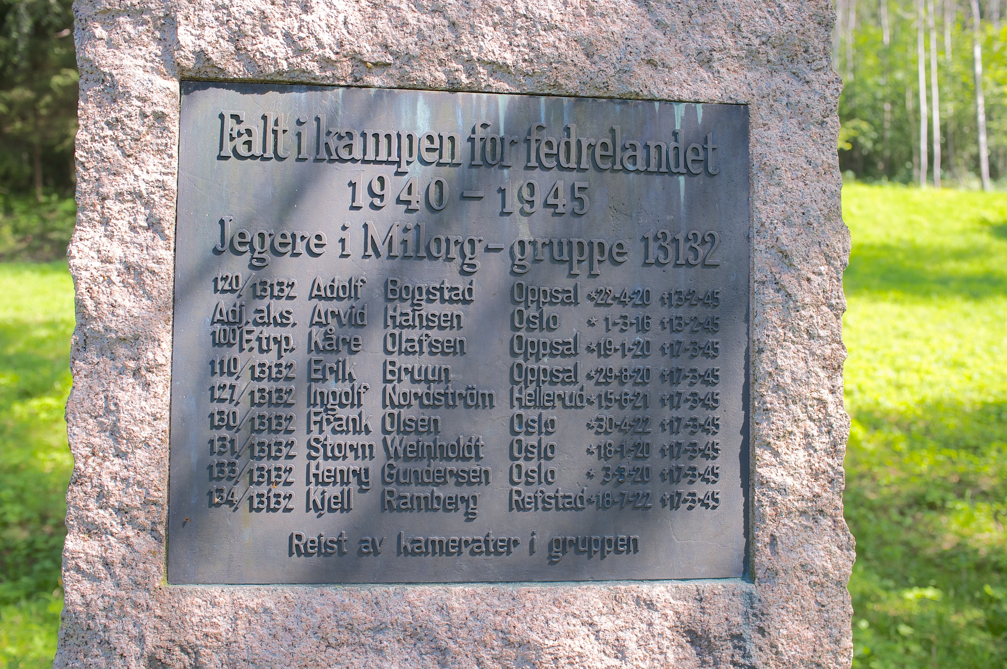 Fra Minnesmerke på Sarabråten i Østmarka. Teksten lyder: Falt i kampen for fedrelandet 1940 - 1945 Jegere i Milorg-gruppe 13132 Adolf Bogstad, Oppsal Arvid Hansen, Oslo Kåre Olafsen, Oppsal Erik Bruun, Oppsal Ingolf Nordstöm, Hellerud Frank Olsen, Oslo Storm Weinholdt, Oslo Henry Gundersen, Oslo Kjell Ramberg, Refstad